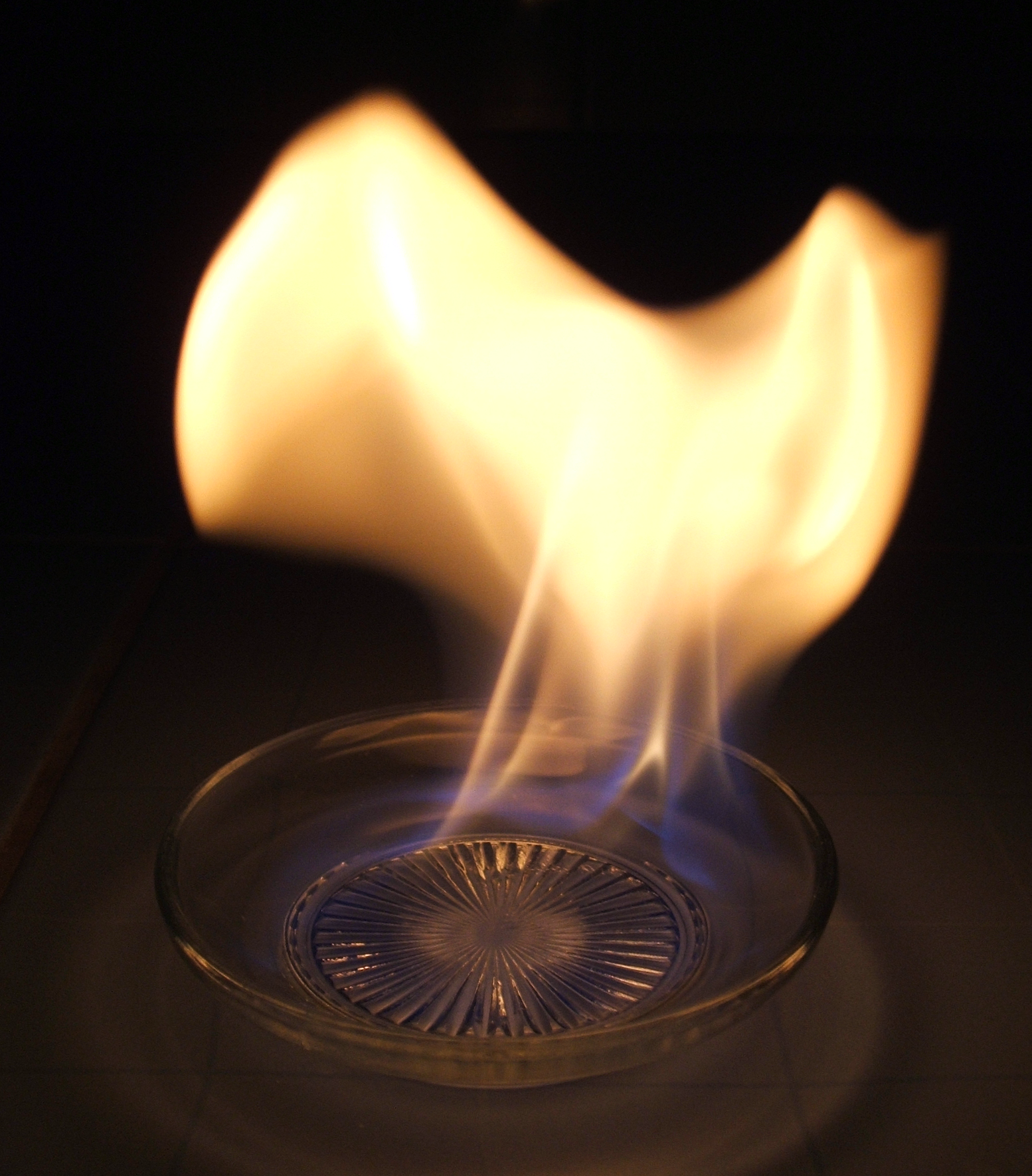 Spalanie spirytusu na spodku